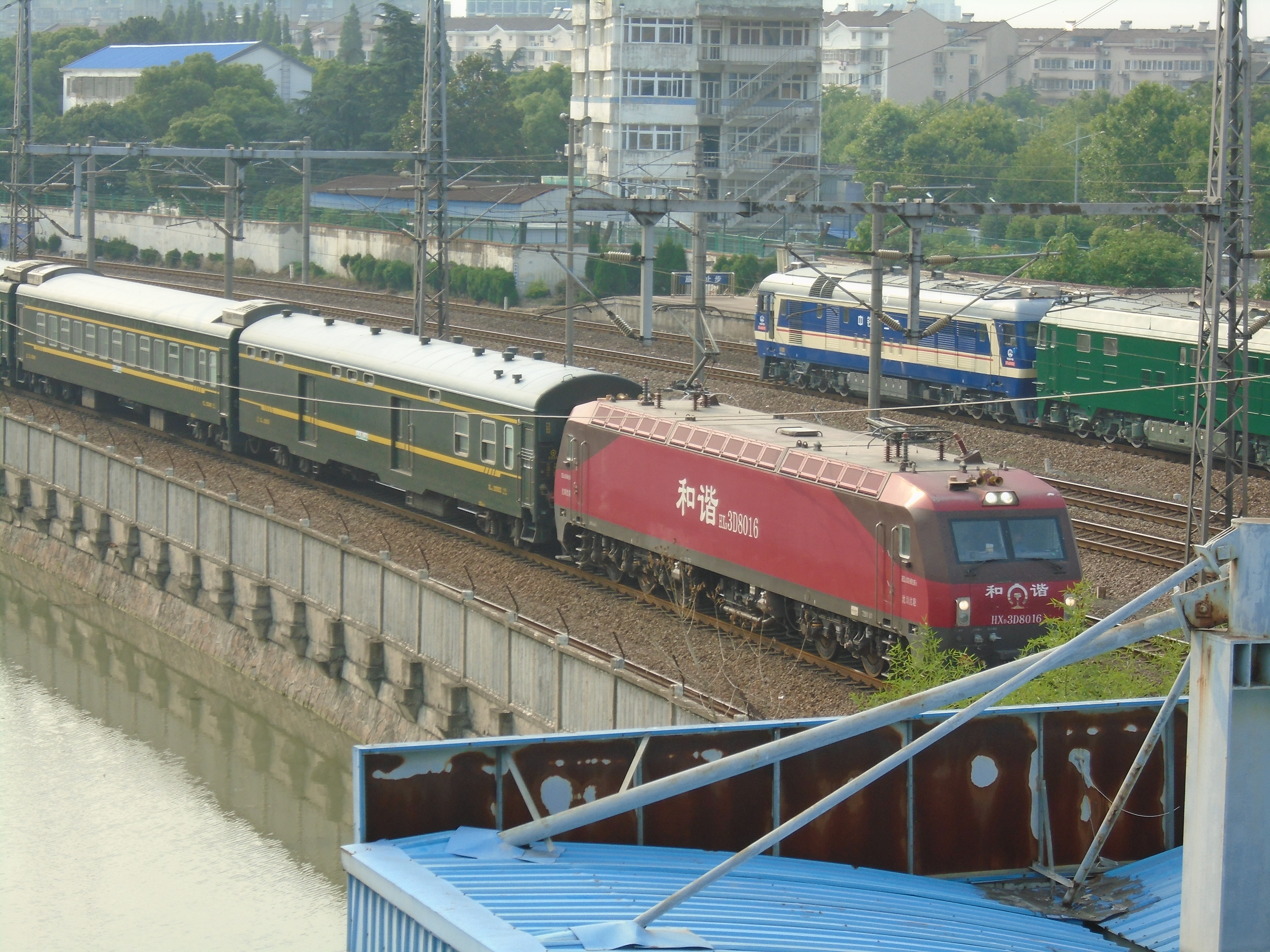 2019年6月15日 和谐电3D8016进入昆山站